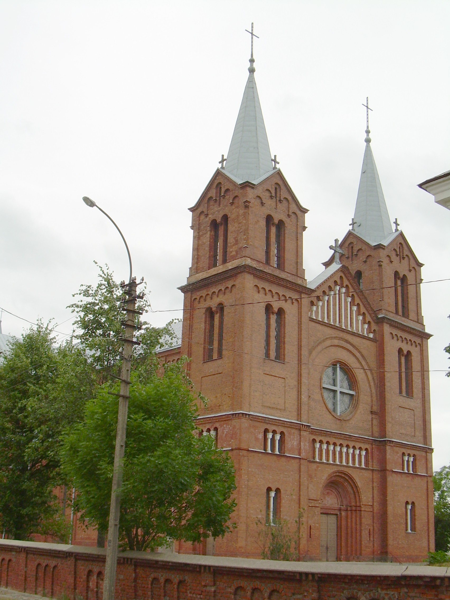 Plungės Šv. Jono Krikštytojo bažnyčia